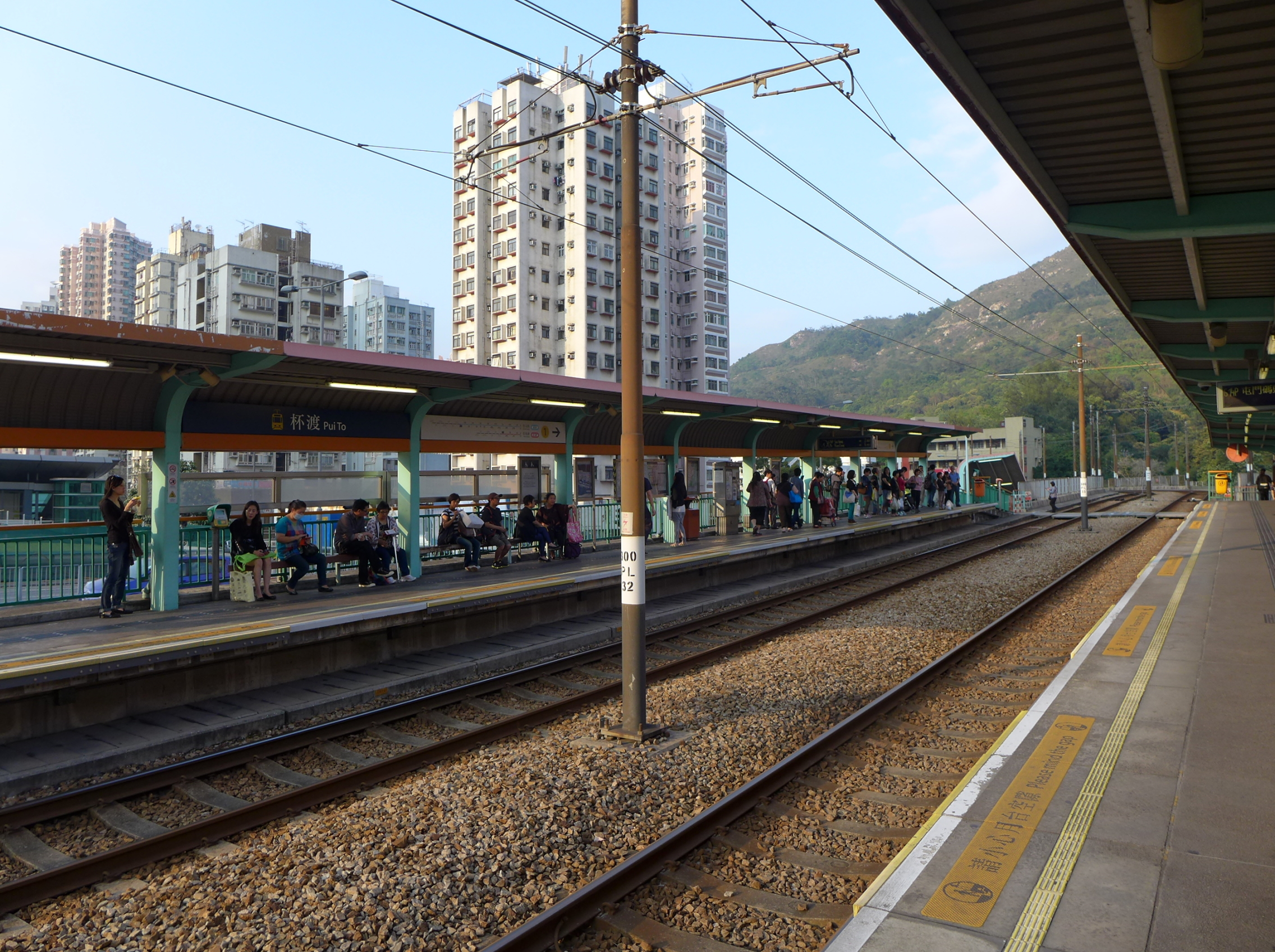 Pui To Stop 杯渡站